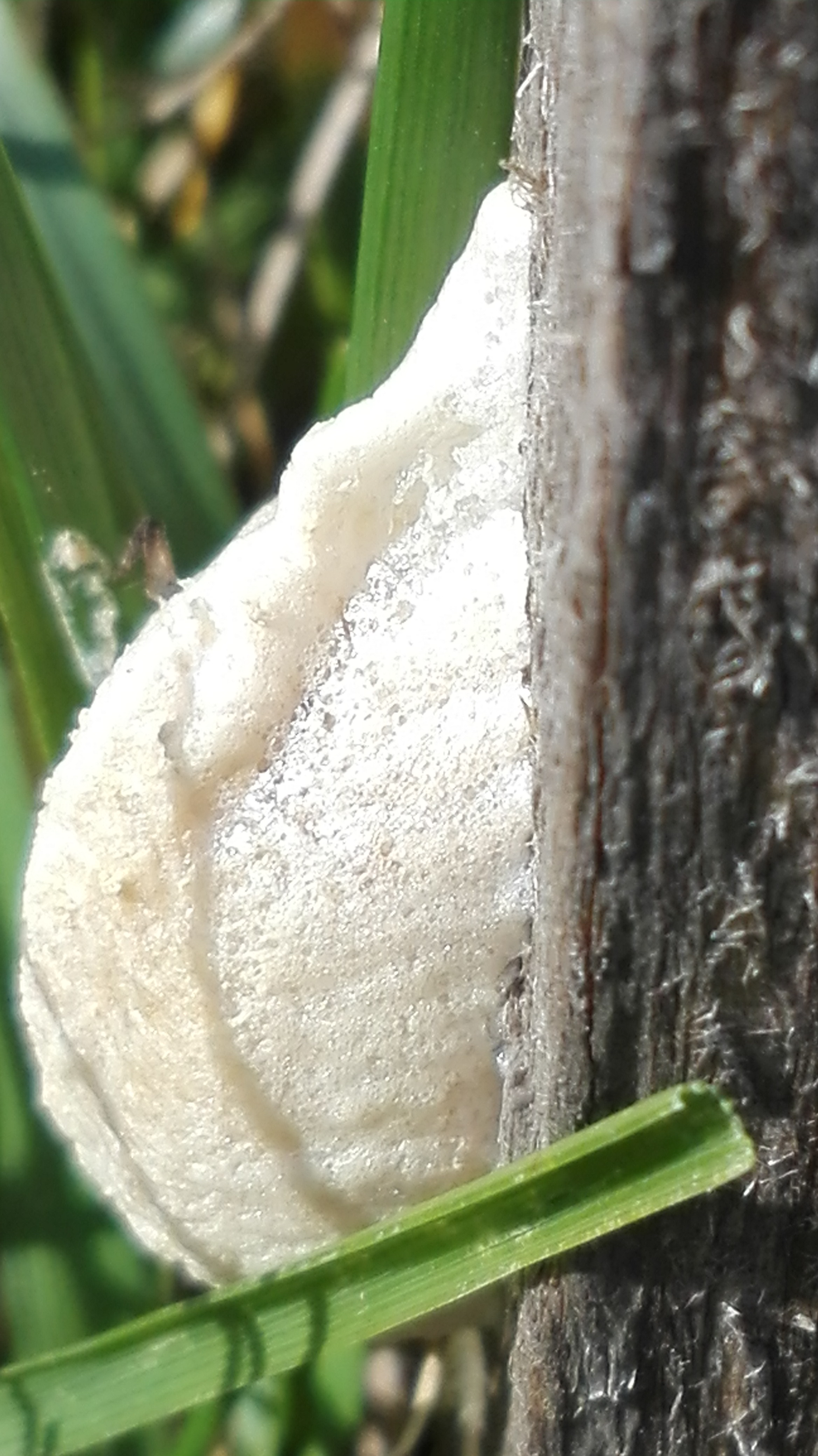 Mantis religios (Imádkozó sáska petéit védő burok, oldalról)